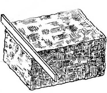 Die Ebenheit des Randschlags wird mit dem Richtscheit überprüft und so lange korrigiert, bis das Richtscheit vollkommen eben aufliegt.